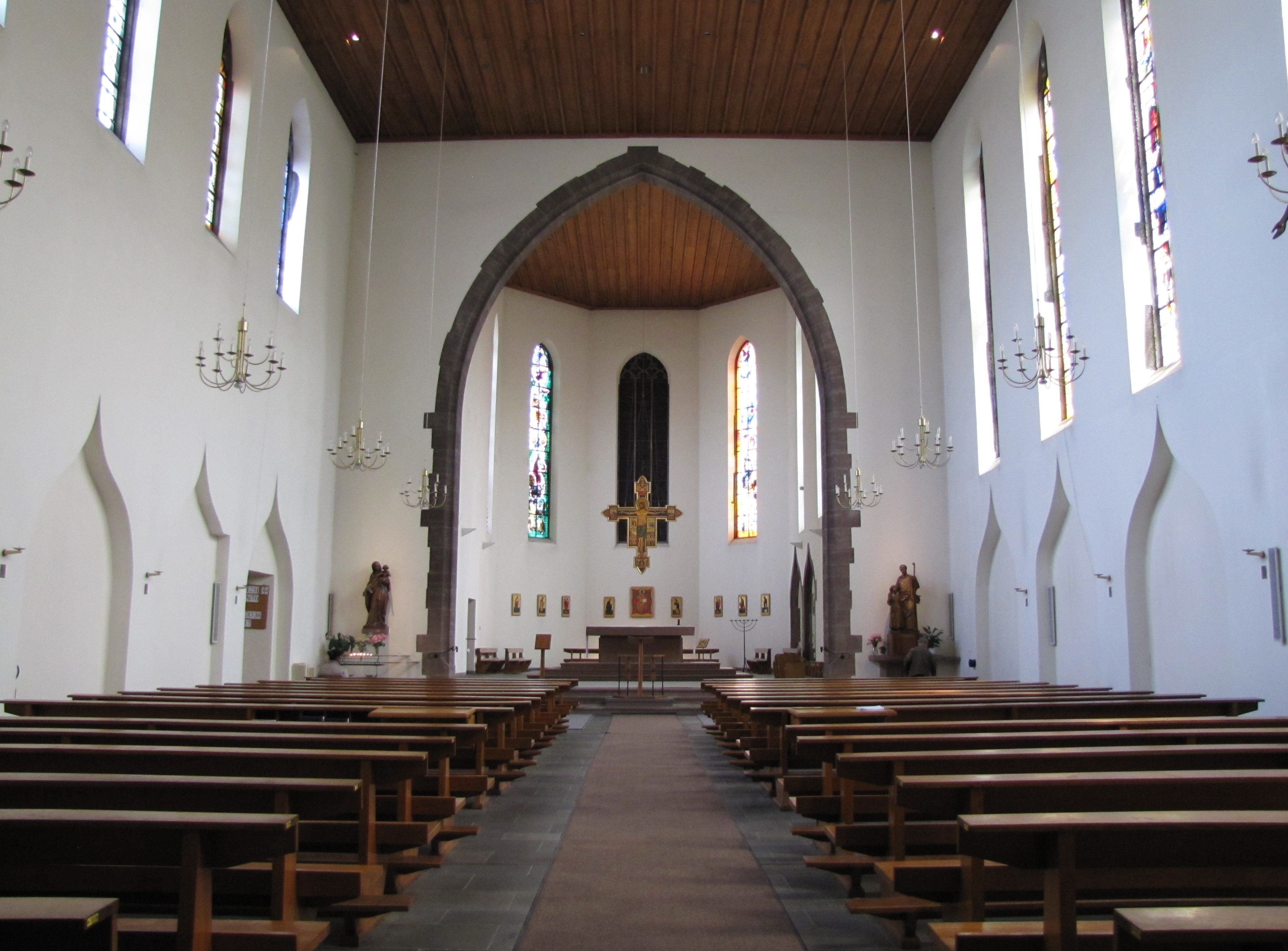 Alsace, Bas-Rhin, Église Saint-Jean de Strasbourg (PA00085027): Vue intérieure de la nef vers le chœur.